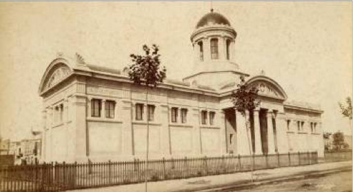 BibliotecaMuseuVíctor Balaguer 1884